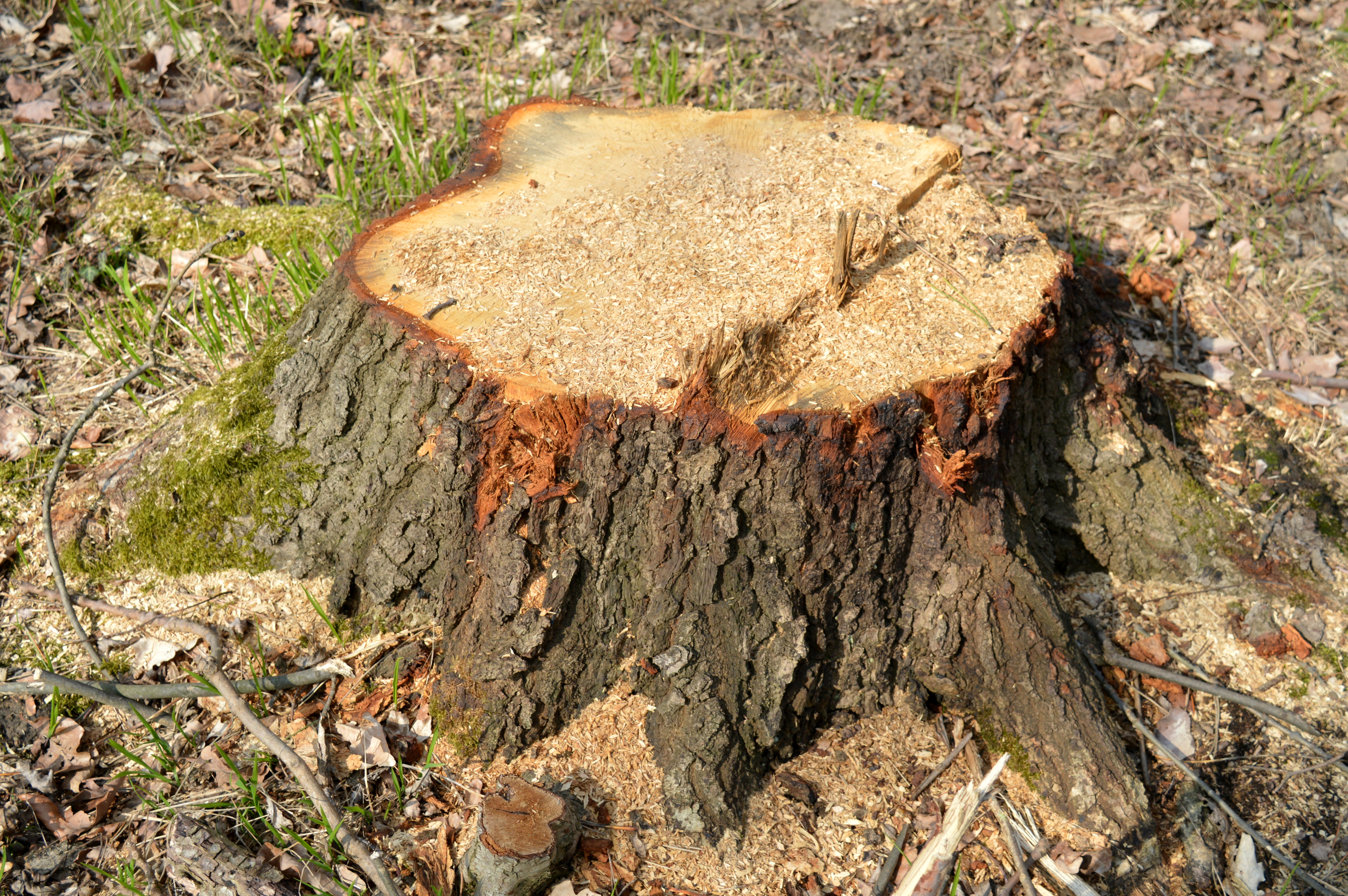 Landschaftsschutzgebiet Klingenberg - Frisch gefällt (4)